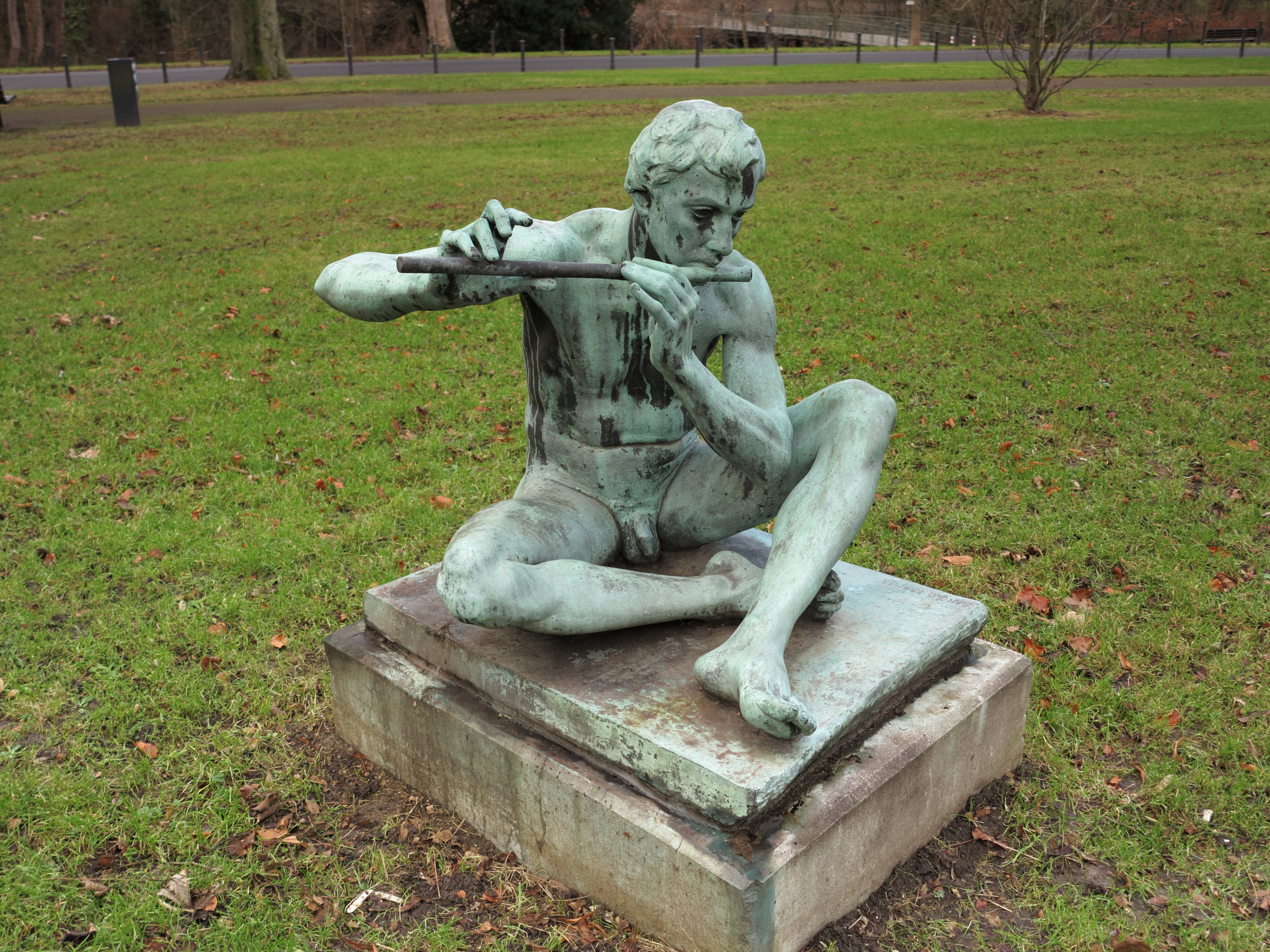 Die Bronze-Skulptur "Hockender Flötenspieler" von Arnold Kramer von 1910/1911. Sie befindet sich in Braunschweig in der Grünanlage am Hohetorwall. 2013 wurde sie von ihrem ursprünglichen Aufstellungsort, dem Skulpturenpark der Villa Gerloff, hierher versetzt.